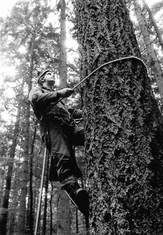 Güstrow, Zapfenernte, Zapfenpflücker ADN-ZB Pätzold-9.9.1986 Bez. Schwerin: Zapfenernte - In einem der höchsten Douglasienbestände Mitteleuropas, im Revier Kiekindemark des Staatlichen Forstwirtschaftsbetriebes Güstrow, ist derzeit die Zapfenernte im vollen Gange. Zehn speziell ausgebildete Zapfenpflücker vom Institut für Forstwissenschaften Eberswalde und aus Forstbetrieben des Bezirkes Karl-Marx-Stadt gewinnen das wertvolle Saatgut auf den bis zu 57 Meter hohen fichtenähnlichen Bäumen, die ursprünglich in Nordamerika beheimatet waren. Mut und Geschicklichkeit erfordert es, um wie Klaus-Dieter Hunzinger Zapfen einer über 50 Meter hohen Douglasie ernten zu können. - siehe auch 1986-0909-3N